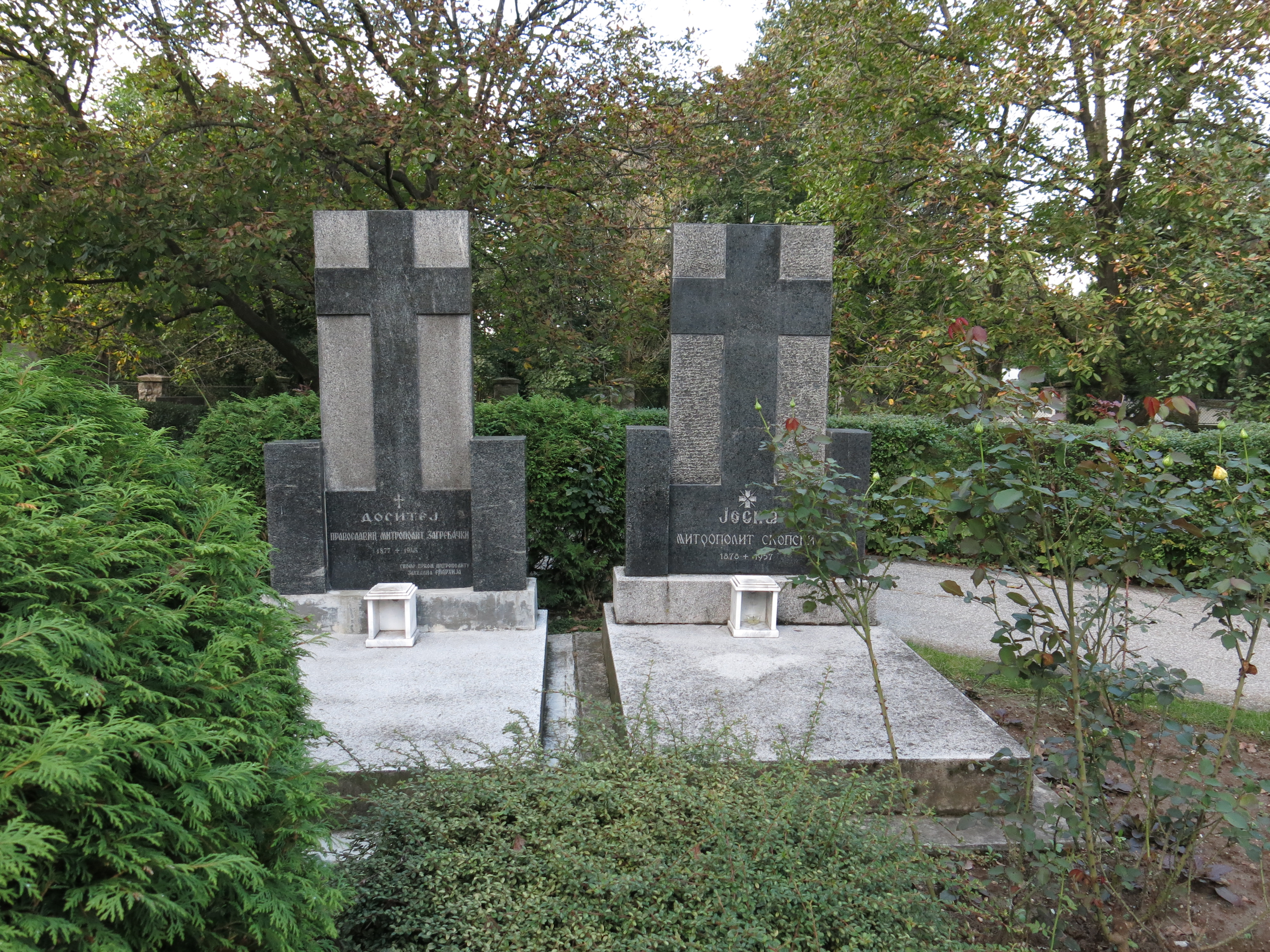 Гробови епископа Доситеја и Јосифа код манастира Ваведење Пресвете Богородице.